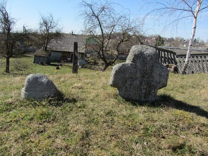 Турэц (Карэліцкі раён). Царква